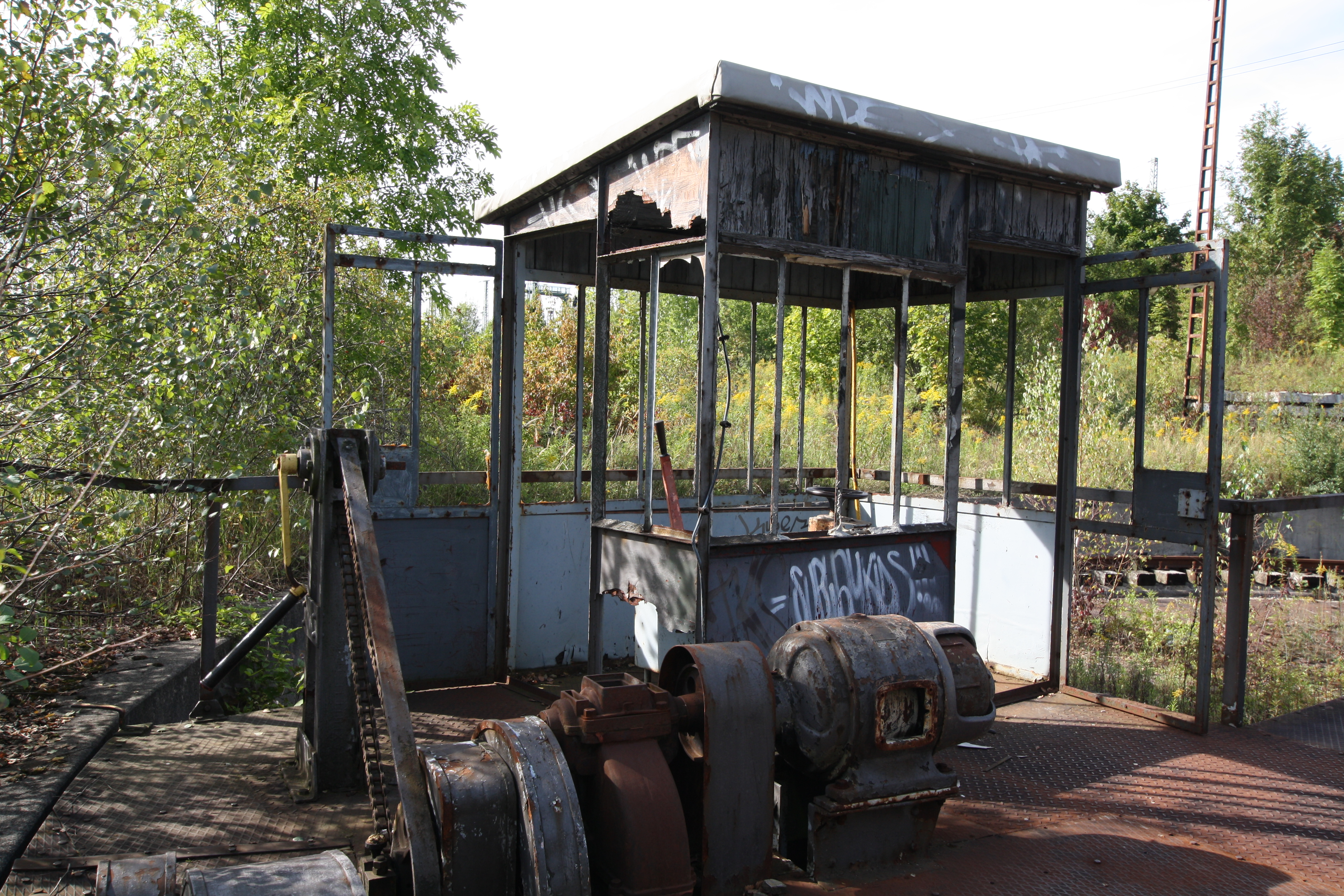 ehemaliges Betriebswerk München 4, Berg am Laim